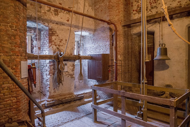 De luidzolder in de toren van de Grote Kerk te Nijkerk.